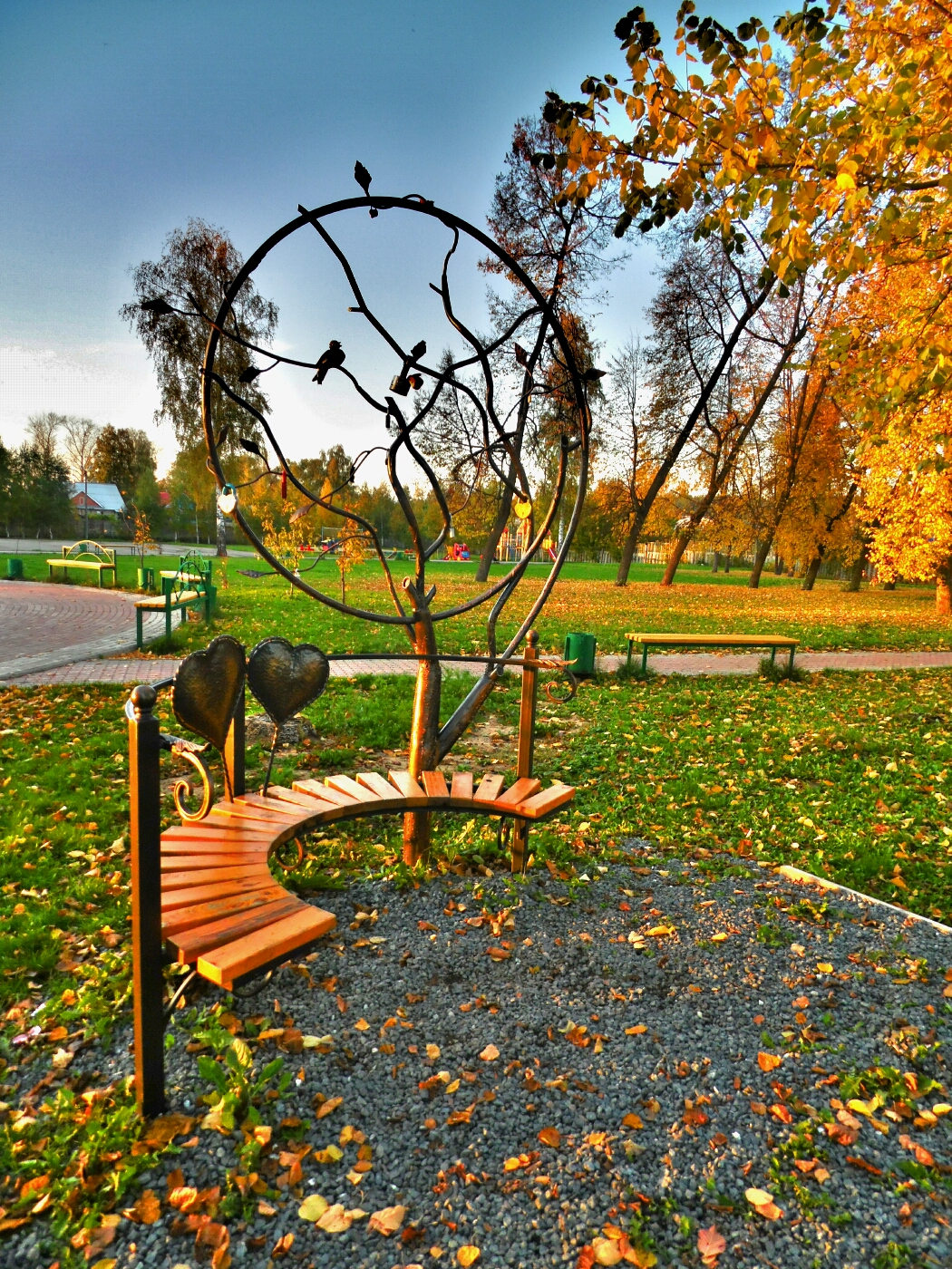 Скамейка "Влюбленных" в парке Шатков